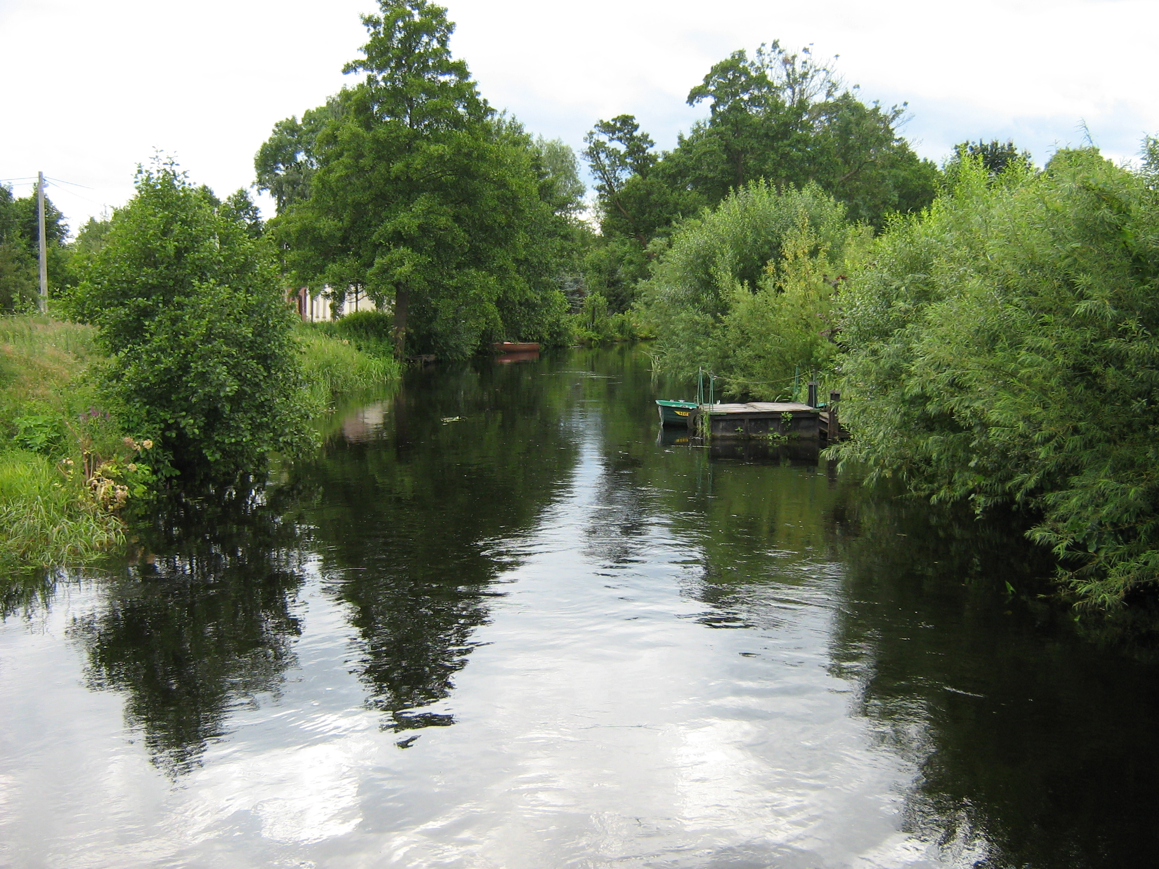 Rzeka Gowienica w Stepnicy